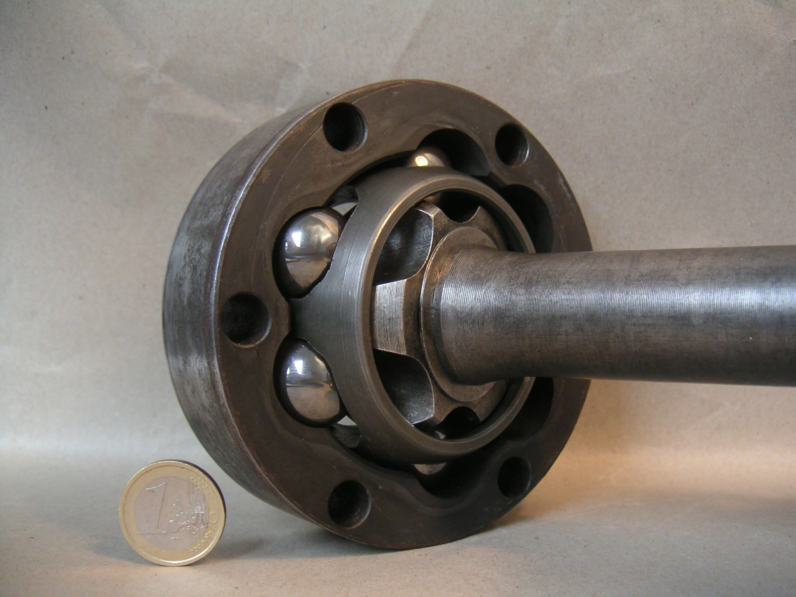 homokinetisches Gelenk der Antriebswelle eines BMW-KFZ (Hinterachse)